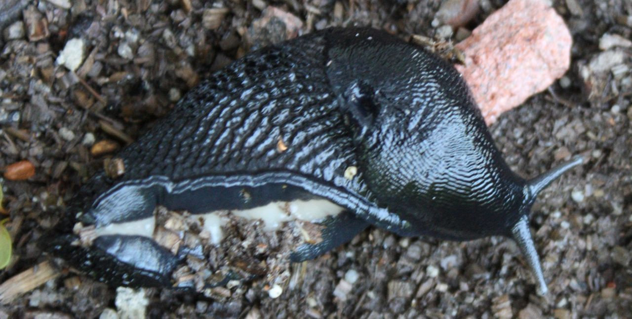 Svartkjølsnegl Limax cinereoniger har en hvit stripe midt under foten, åndehullet bak midten av kappen og kjøl på bakkroppen.Template:Byline